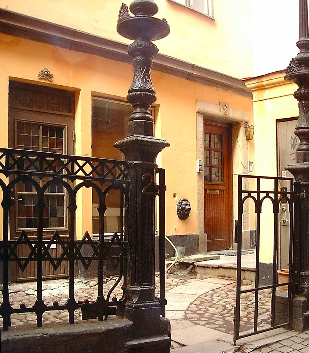 A small courtyard at Spektens Gränd in Gamla stan, Stockholm.